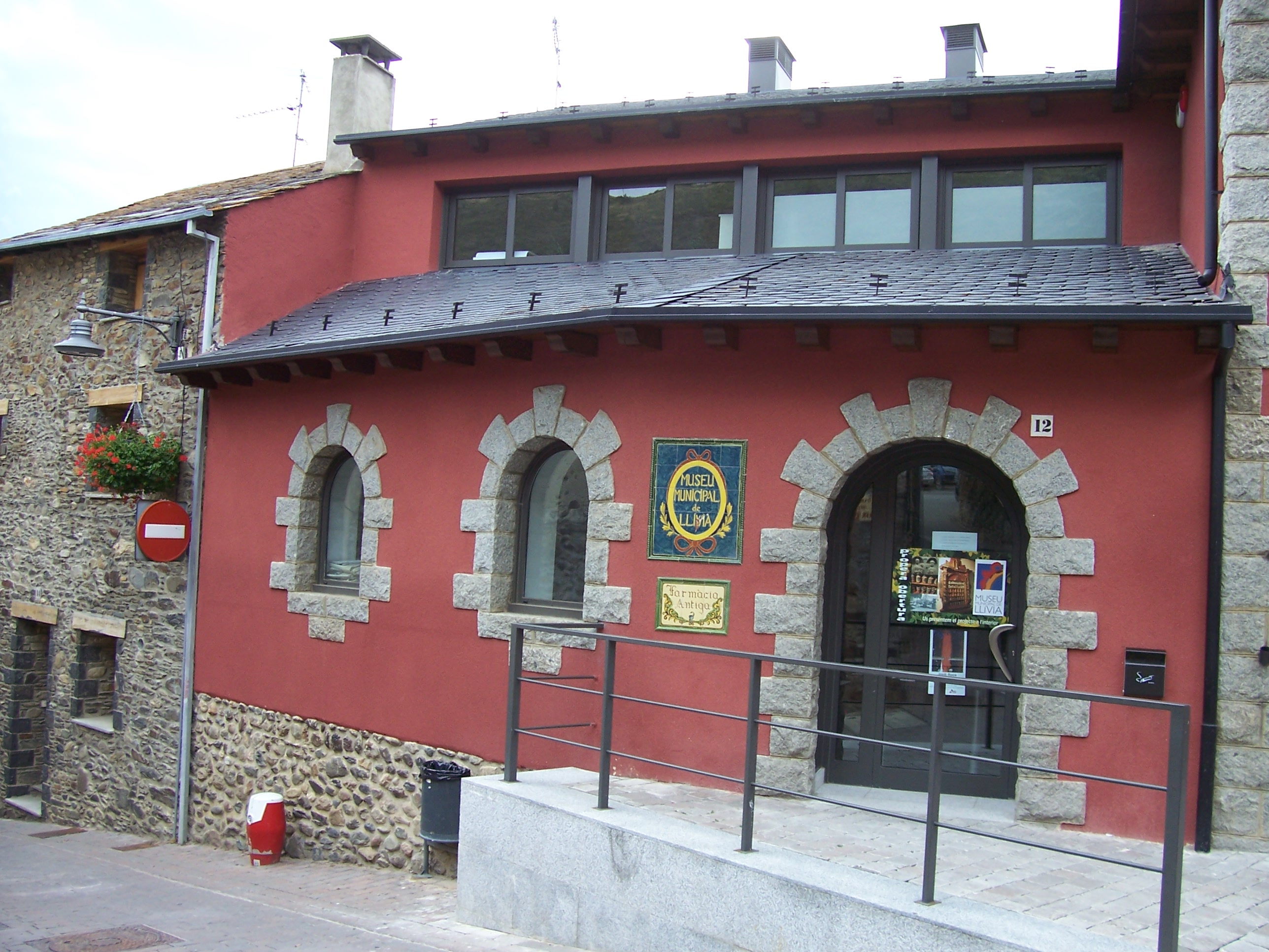 La "Farmàcia antiga" de Llívia (Cerdanya, Catalunya, Països Catalans).